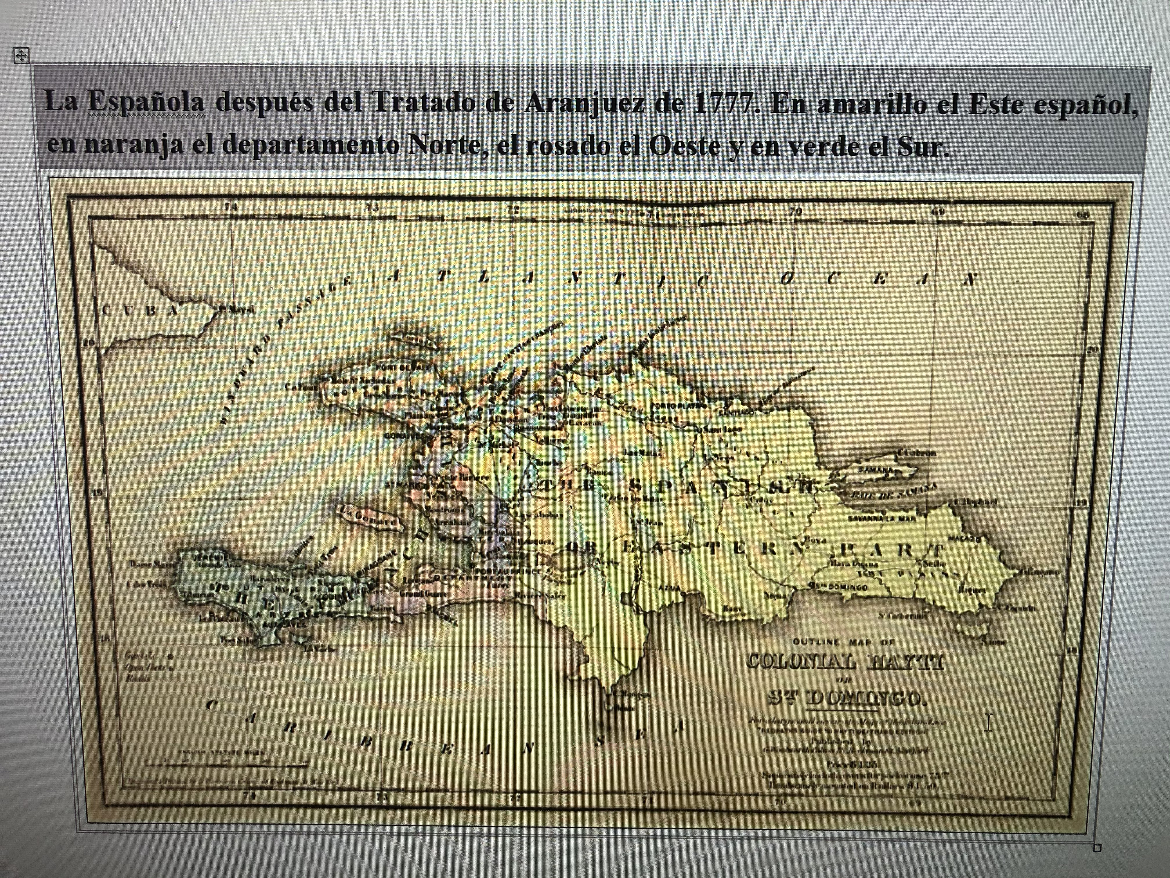 La Española después del Tratado de Aranjuez de 1777. En amarillo el Este español, en naranja el departamento Norte, el rosado el Oeste y en verde el Sur.